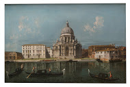 Santa María de la Salud, Venecia, vista desde el Gran Canal